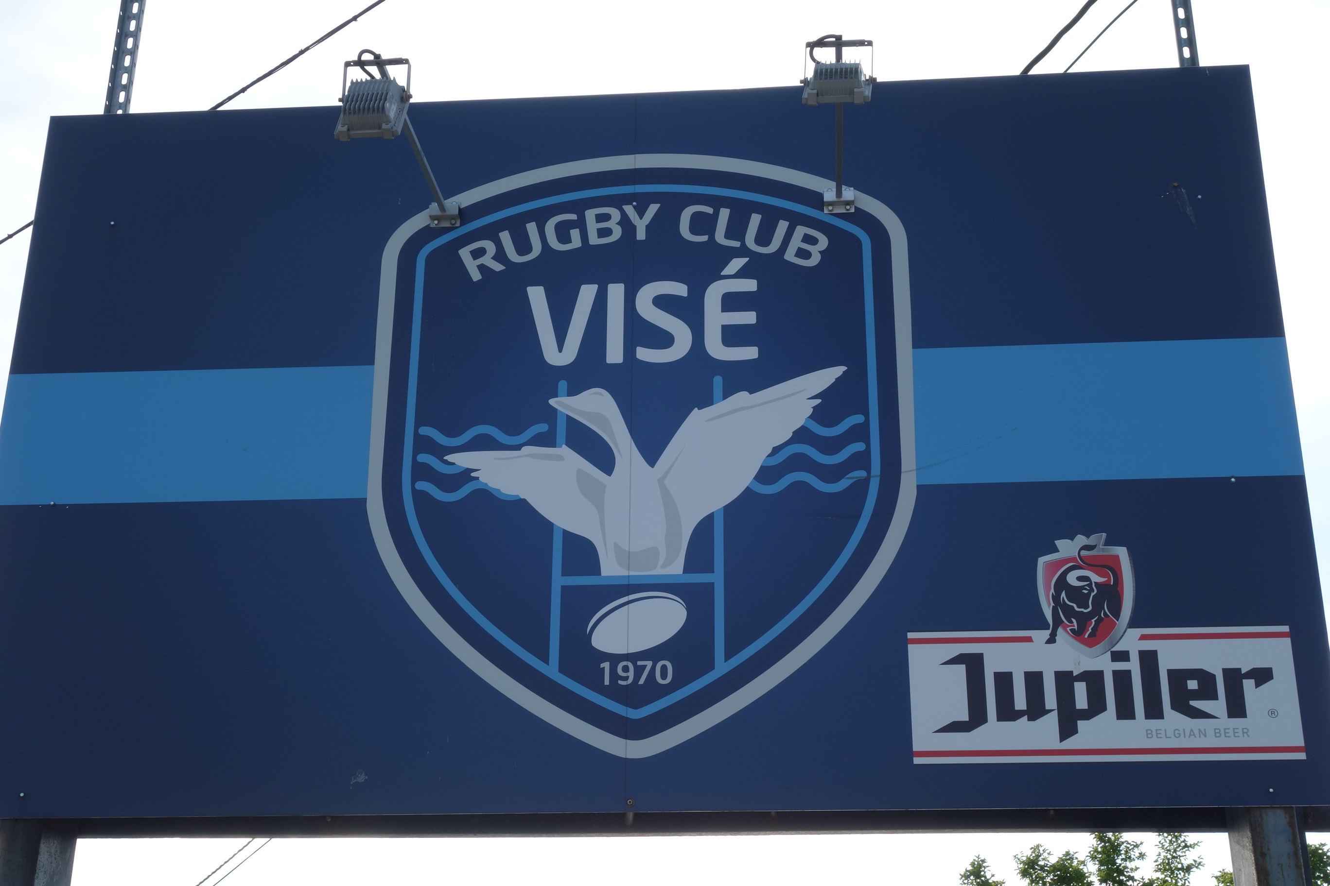 Rugbyclub van Visé met een gans in het logo, in juli 2020.